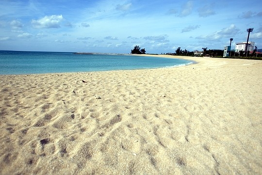 A beach in Nago, Okinawa.